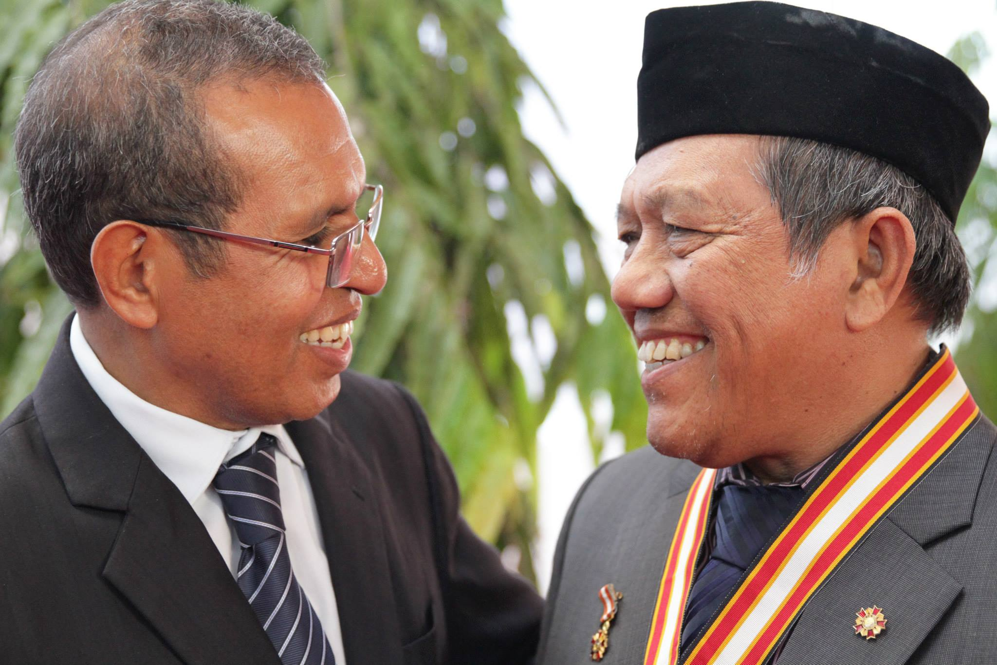 Verleihung des Ordem de Timor-Leste, 30. August 2014. Taur Matan Ruak und Muchtar Pakpahan